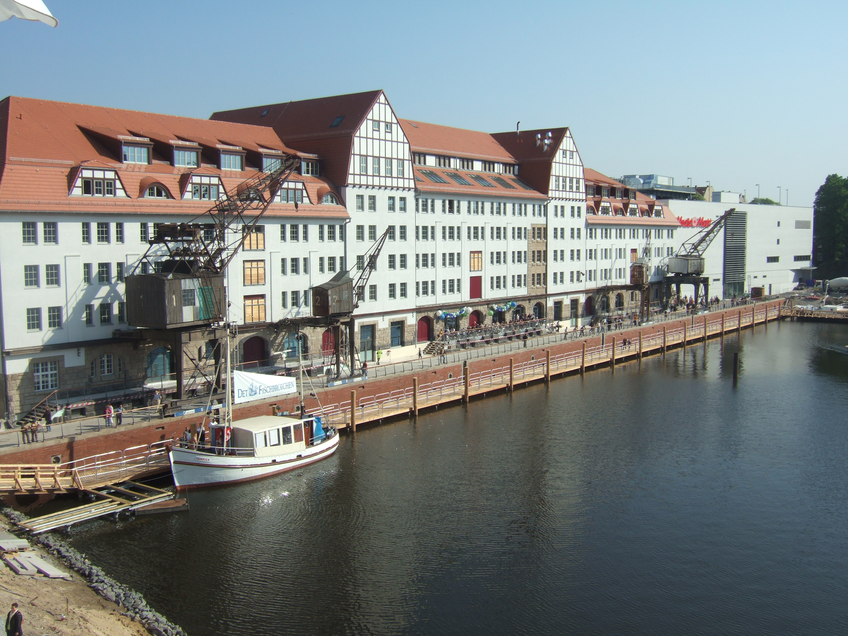 Einkaufszentrum Tempelhofer Hafen mit historischem Speicher, aufgenommen am Tag der Eröffnung am 29.04.2009